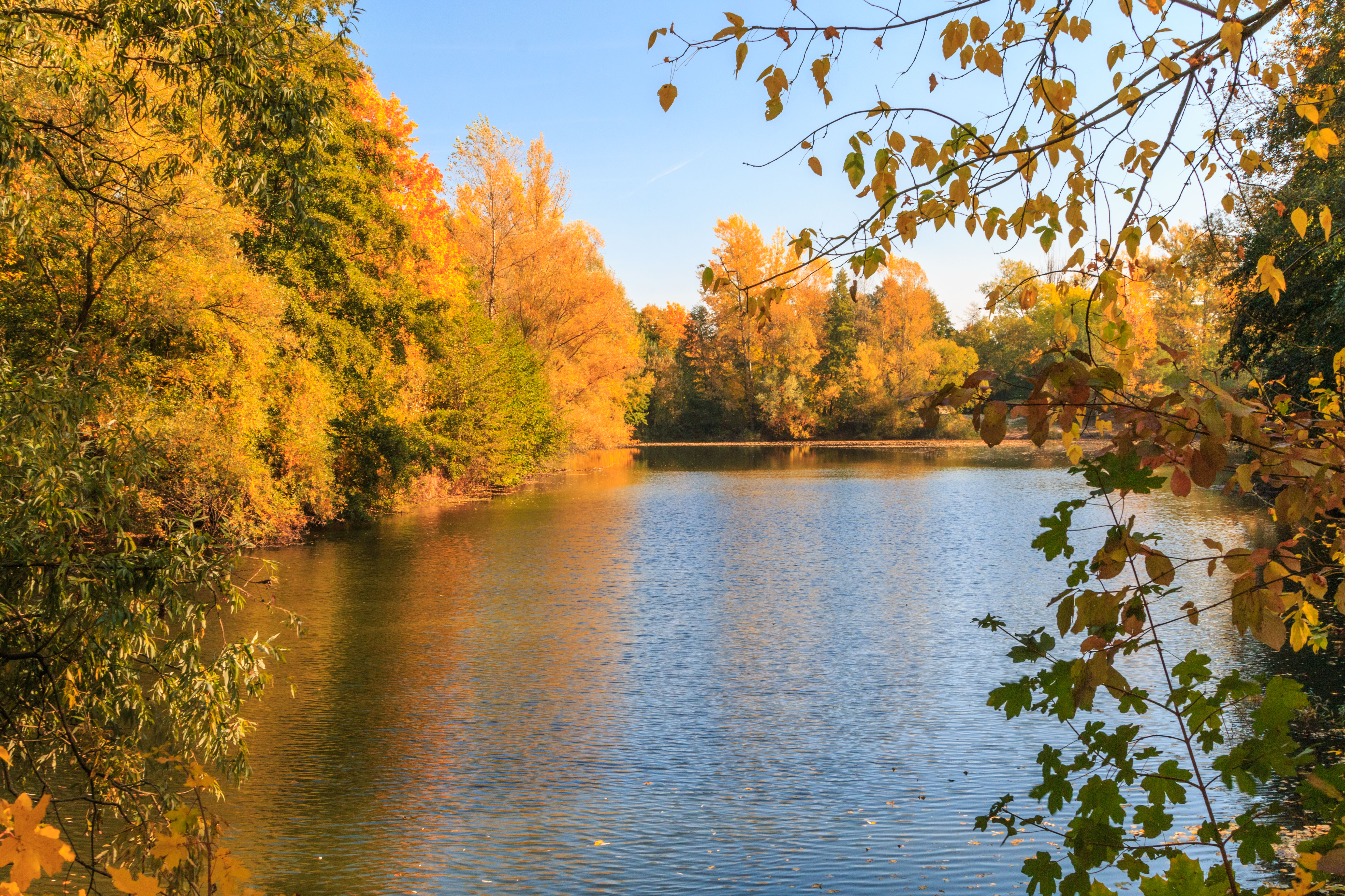 Písník pod Ornstovými jezery Project: Vodstvo.